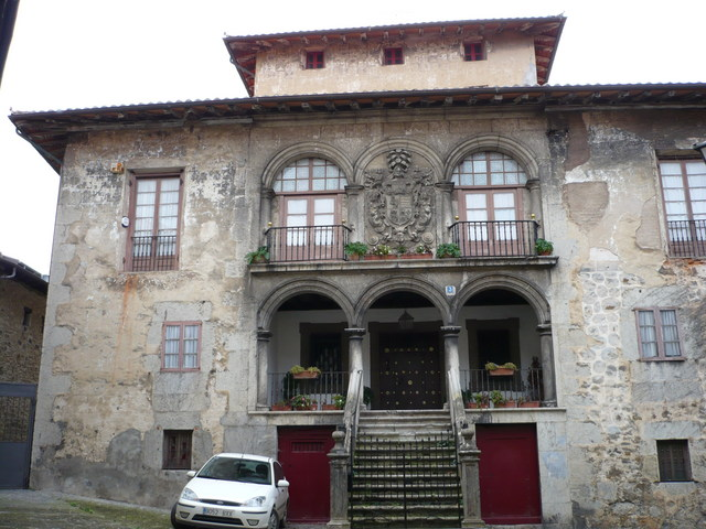 Lekeitioko Uriarte jauregia